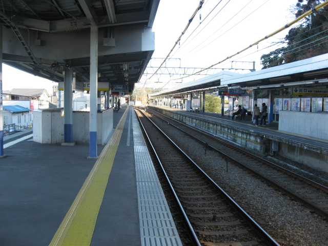 堀ノ内駅ホーム 2007.12.16 laurel04spl撮影